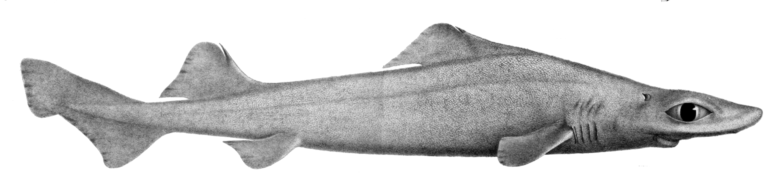 Centrophorus squamosus